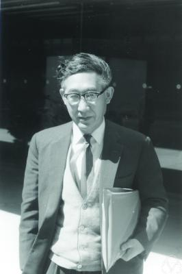 Iyanaga Shōkichi 1969 in Tokyo